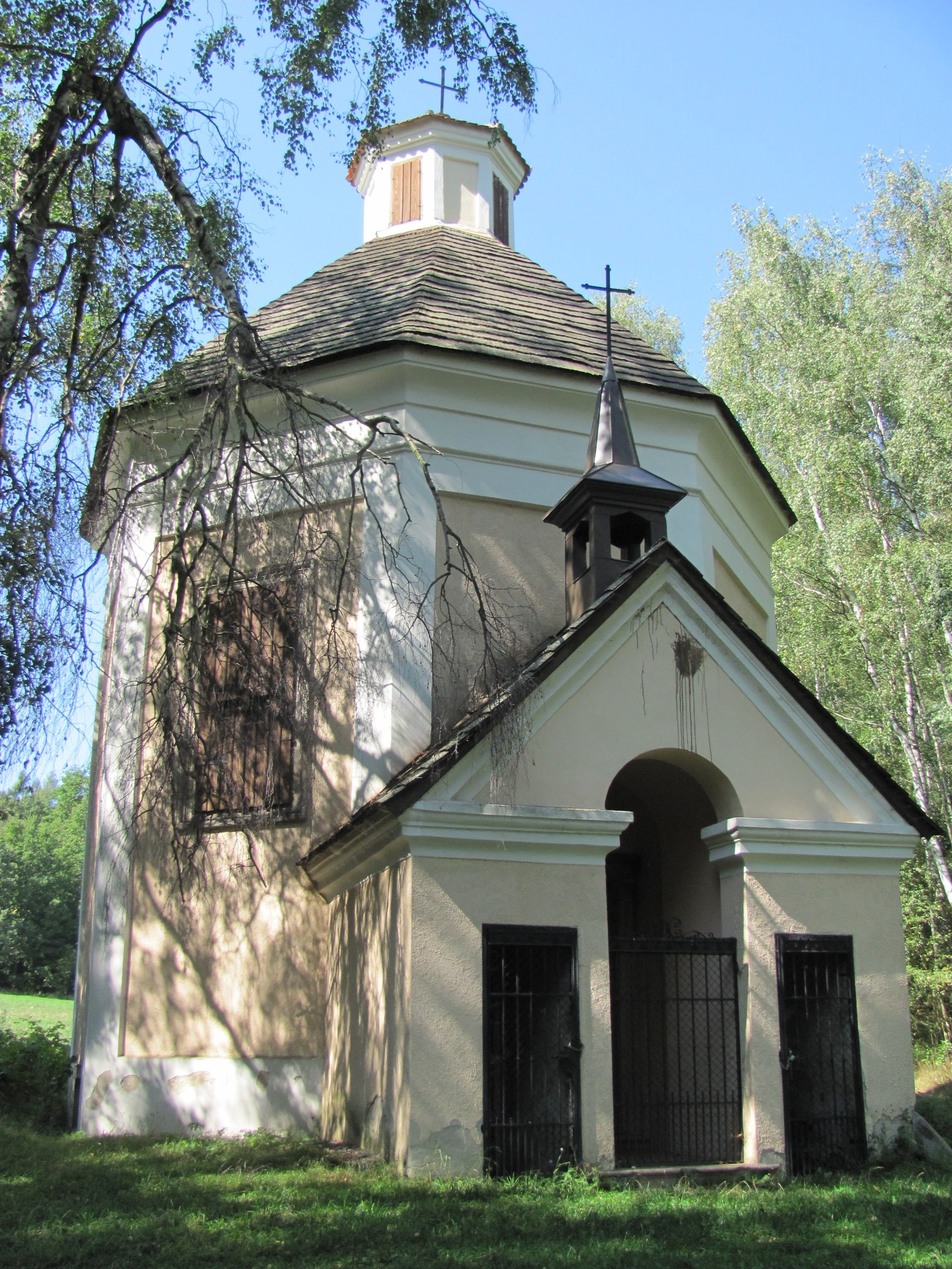 Kaple svatého Karla Boromejského, Telč-Štěpnice, parc. st. 616, pp. 1222/1 a okolí, Telč.